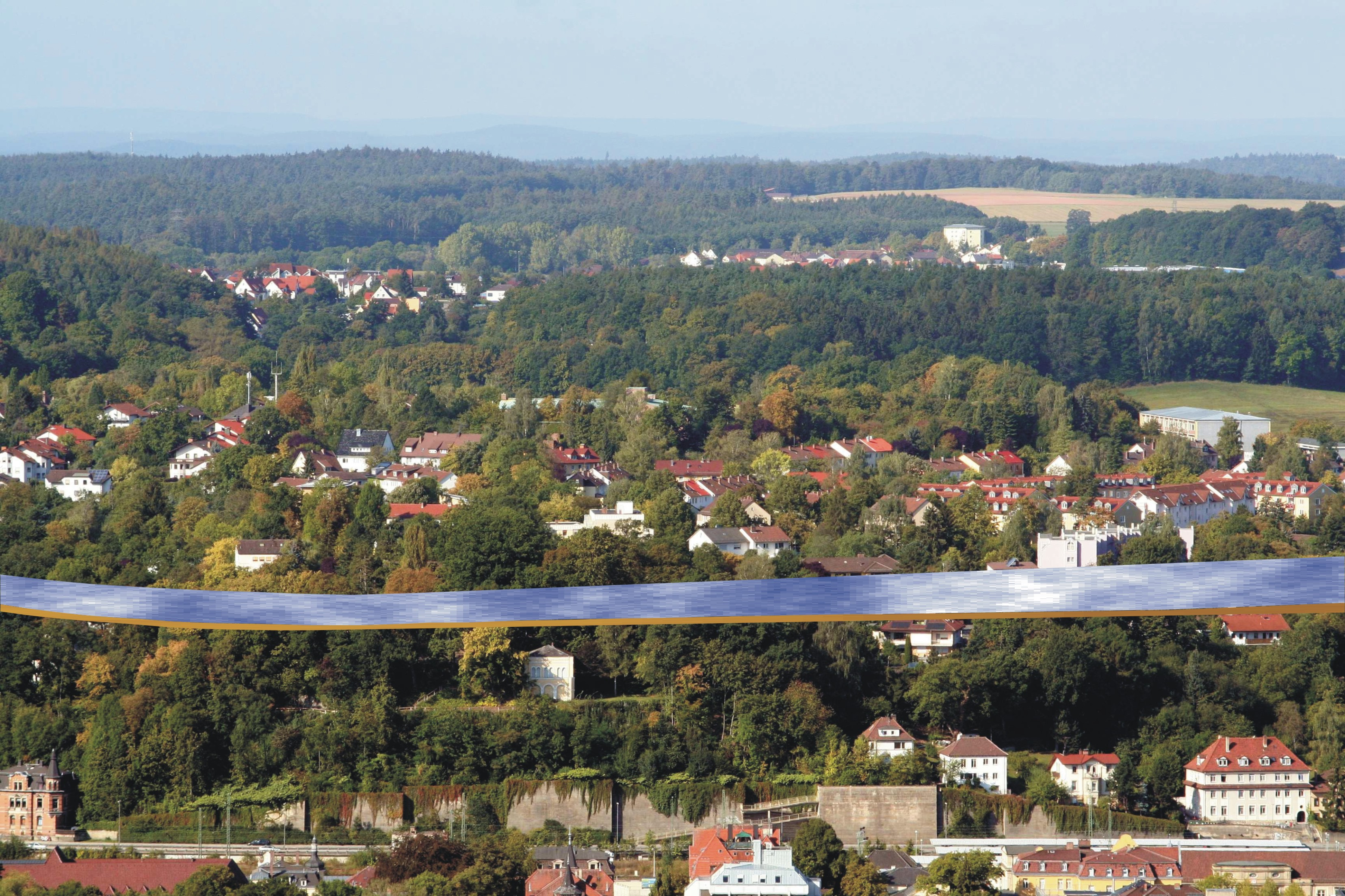 1940 geplanter Verlauf des Main-Werra-Kanals am Adamiberg in Coburg. Im Vordergrund rechts der Coburger Bahnhof.